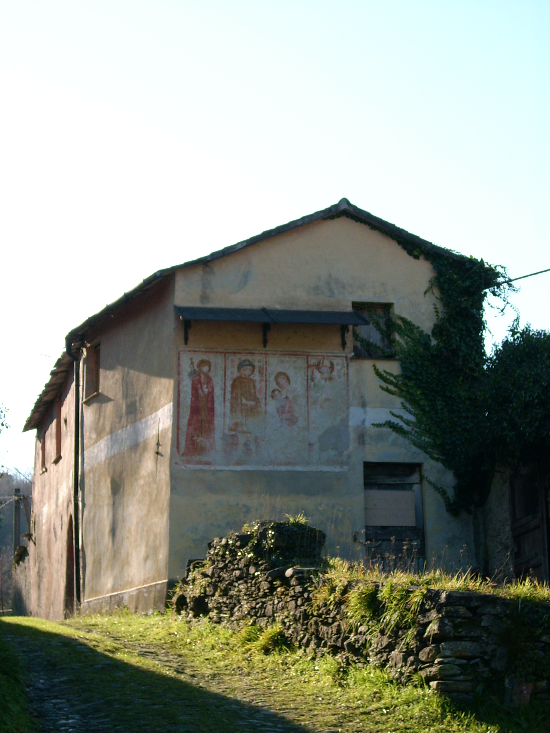 Il Lazzaretto presso Santa Maria del Campo (Rapallo), Liguria, Italy